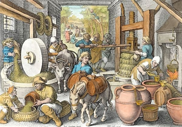 une scène d'un moulin à huile avec les différentes étapes du travail de l'huile d'olive, du pressurage à la clarification jusqu'à la conservation en orci. Commandée à Giovanni Stradano (Jan Van Der Straet) par Luigi Alamanni (1558-1603), érudit et noble florentin, entre 1587 et 1589, cette planche est gravée et publiée par Philippe Galle dans la collection « Nova Reperta ».